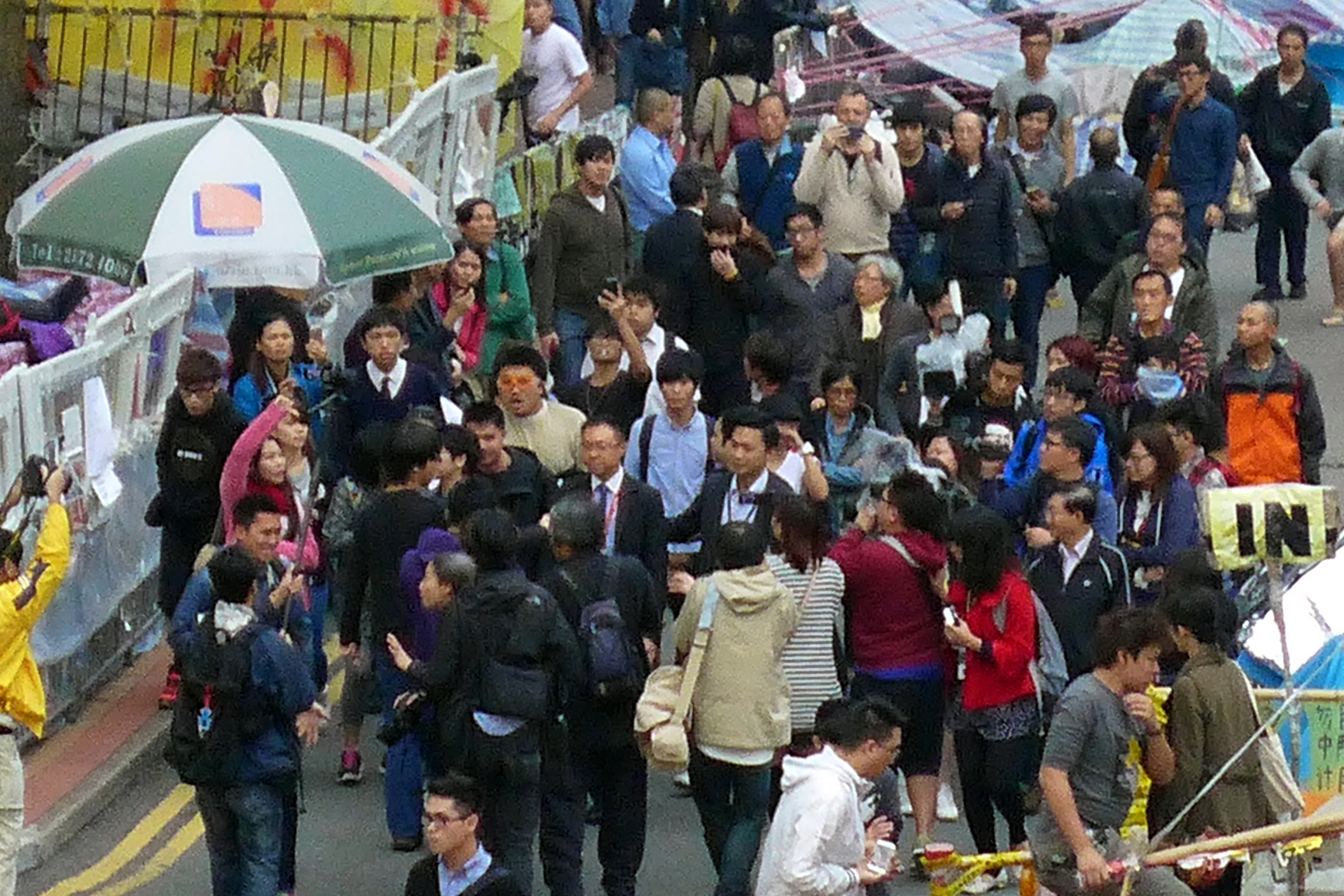 Sean Lin Visit Admiralty